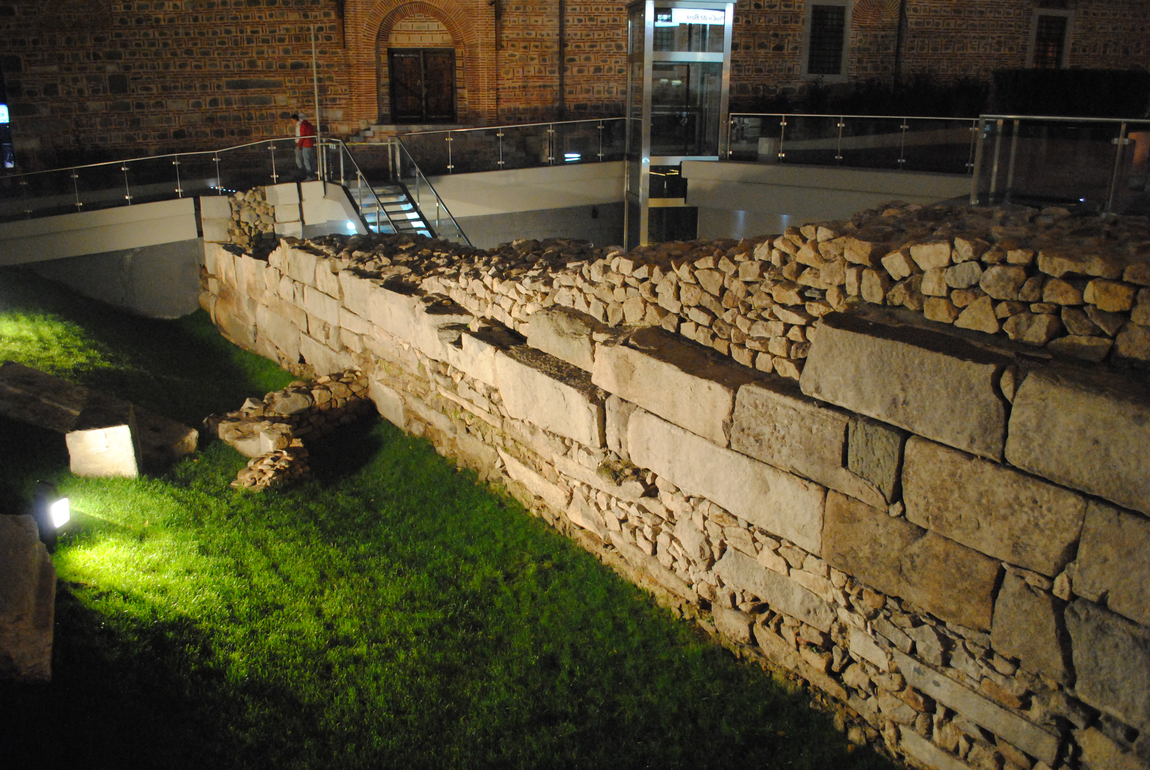 Римски стадион, Пловдив, България